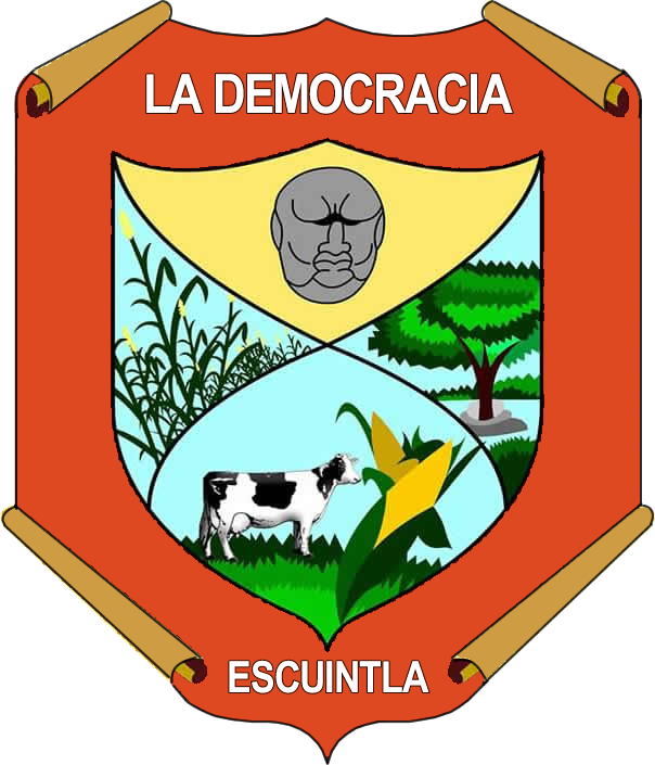 Logotipo del municipio de La Democracia, Escuintla